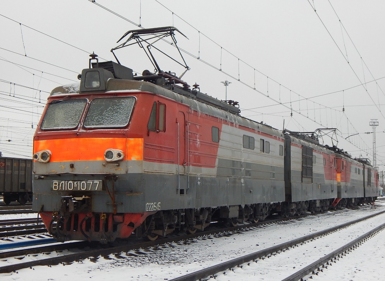 С завода поступил в депо Пенза-III (05.1973 г.) 09.1976 — передан в депо Рузаевка. 11.1993 — передан в депо Пенза-III. 01.2007 — передан в депо Кинель. СР Челябинский ЭРЗ 05.1978 г. КР-1 Челябинский ЭРЗ 04.1983 г. КР-2 Челябинский ЭРЗ 07.1987 г. КР-1 Екатеринбургский ЭРЗ 08.1995 г. МЛП Челябинский ЭРЗ 12.2004 г. До 12.2004 г. был оборудован ЭПТ и системой электроотопления пассажирских вагонов.